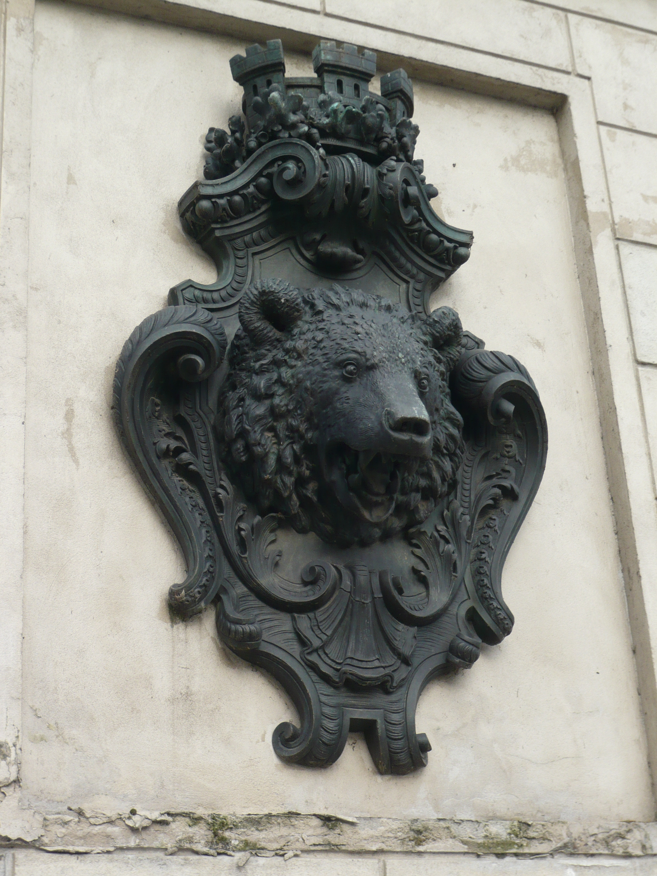 Berlin; Liebknechtbrücke